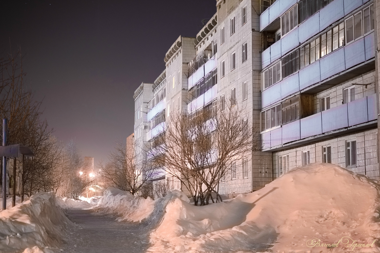 Ночной микрорайнон "Солнечный"